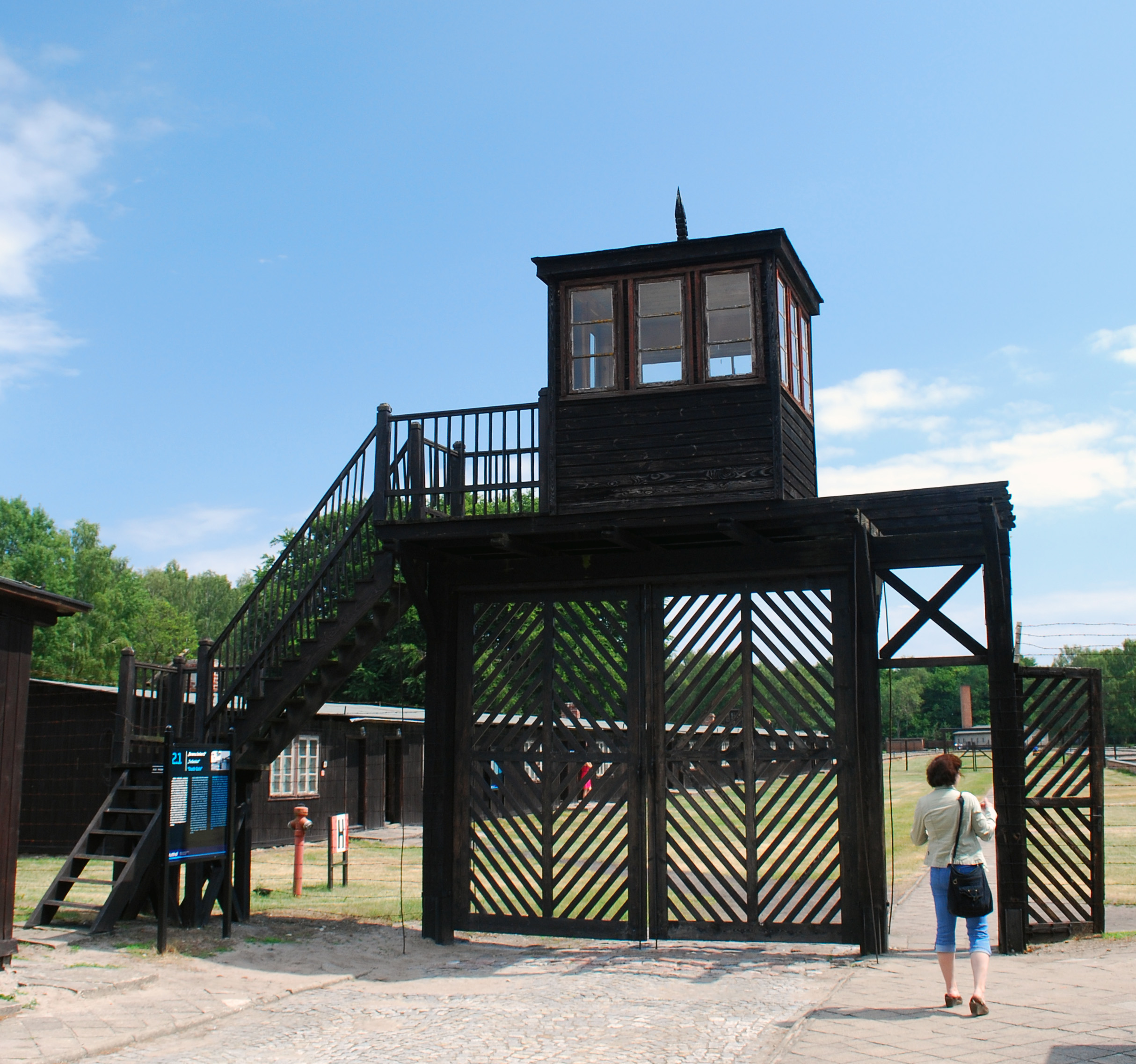 Brama śmierci w obozie KL Stutthof.